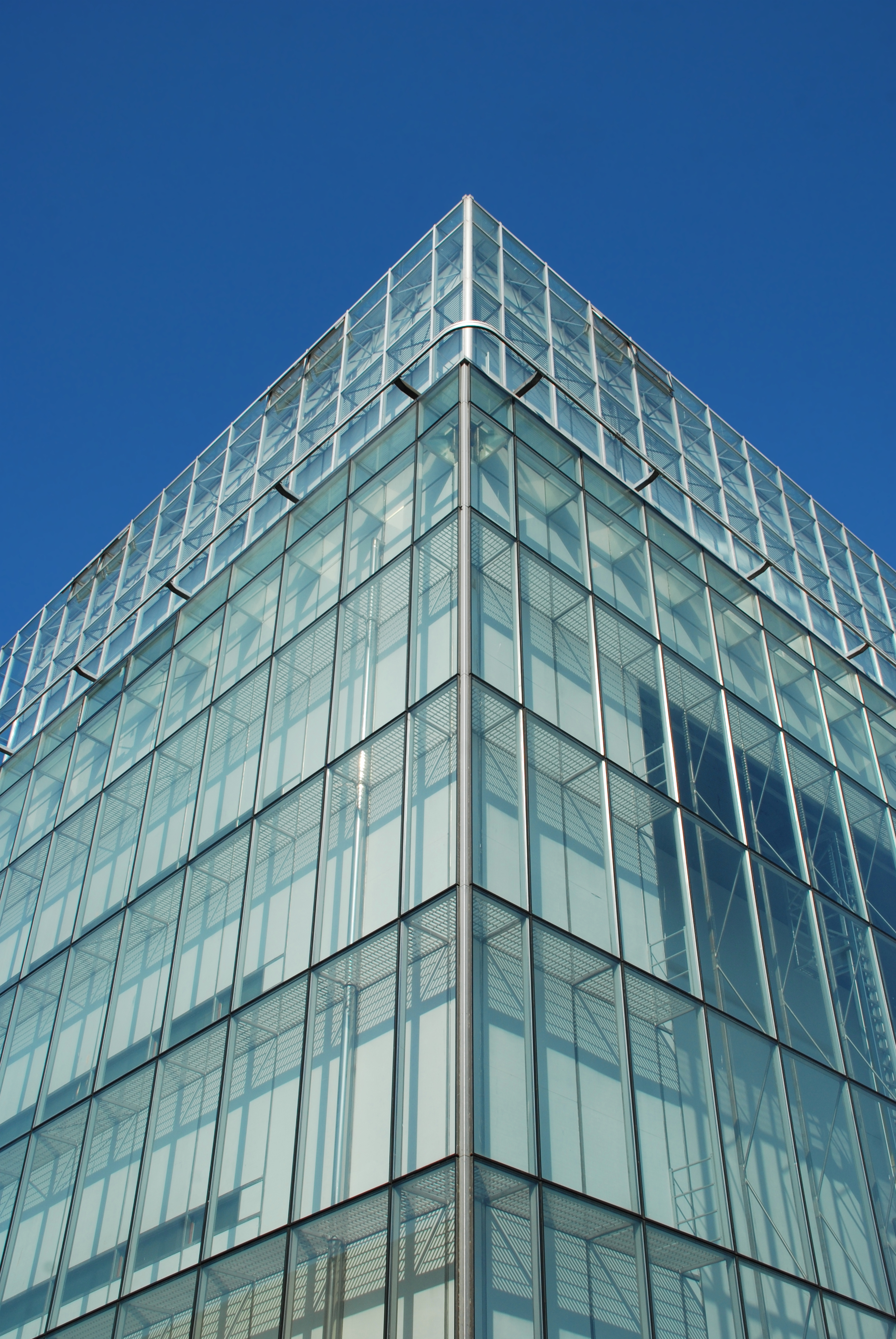 Belgique - Louvain-la-Neuve - Aula Magna (postmodernisme, bureau d'architecture Philippe Samyn and Partners, 1999-2001)